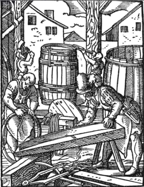 Tonnellerie XVIe siècle